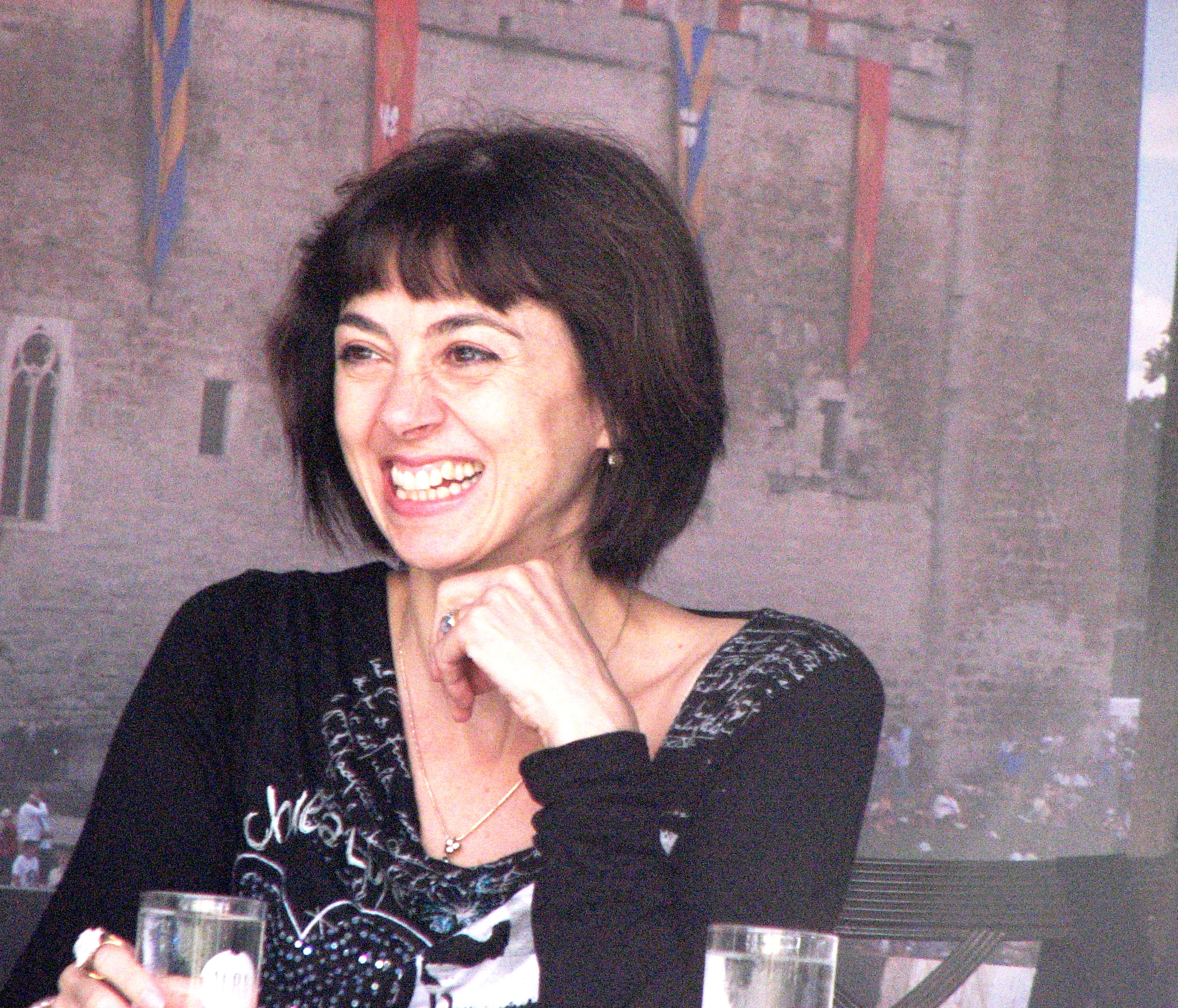 Nina Ananiašvili esinemas Kuressaare Arensburgi ooperikohvikus